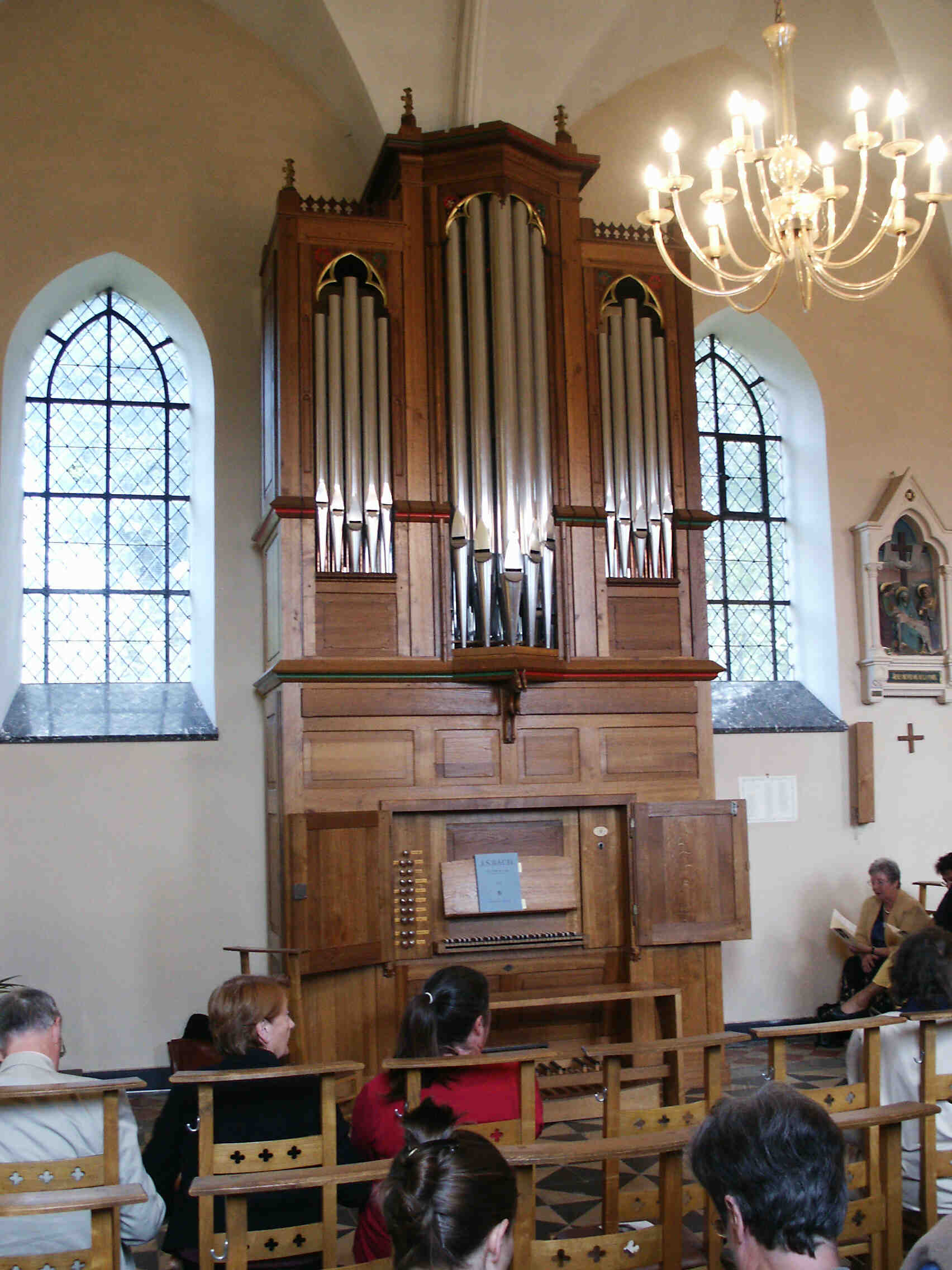 Bernard Foccroulle at the organ at the start of his concert of 19-09-2004. Photo vun der Westenfelder-Uergel zu Membre-sur-Semois Photo téléchargée par User: Les Meloures avec la permission du propriétaire de la page-source.